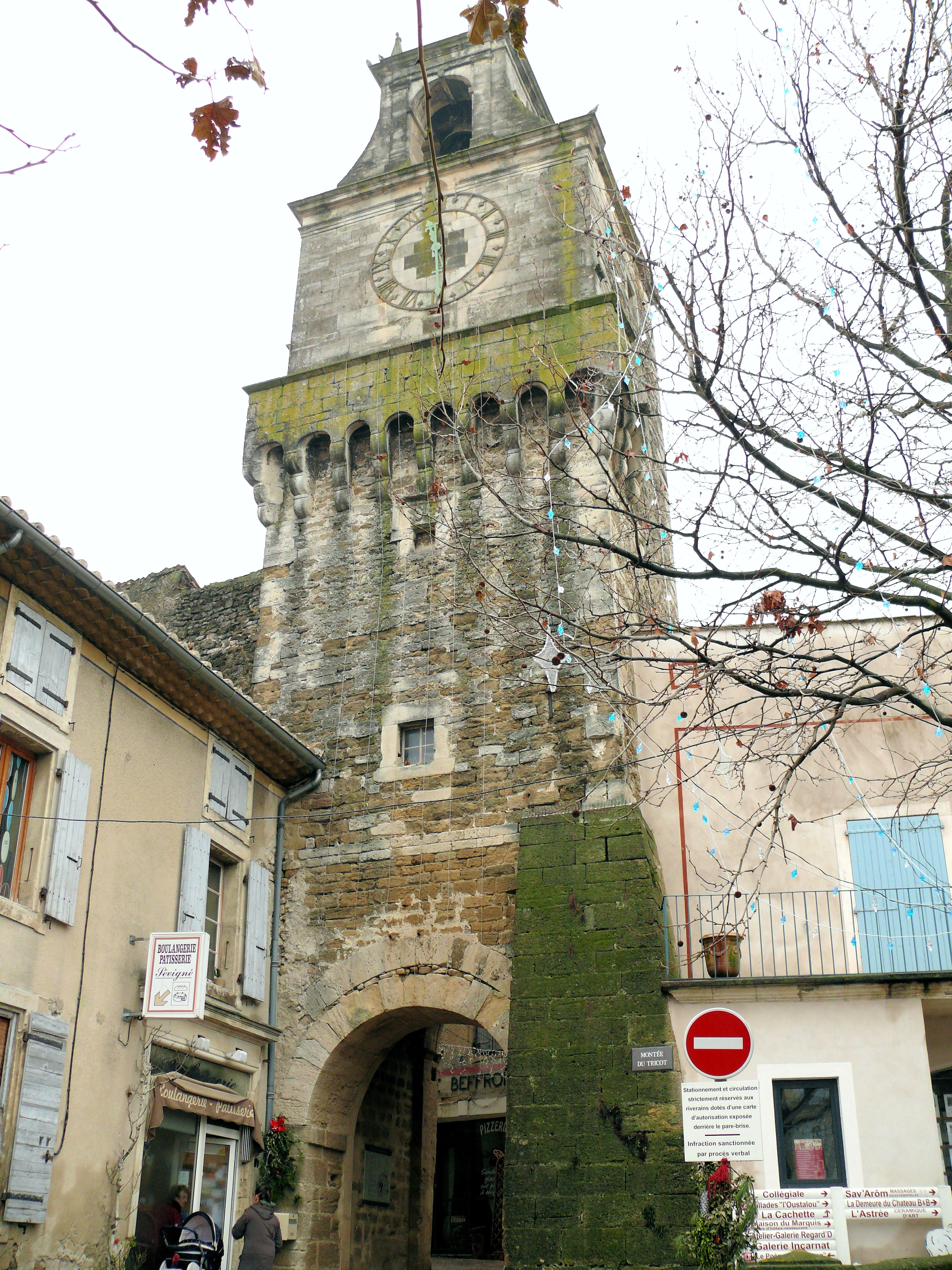 Grignan - Beffroi